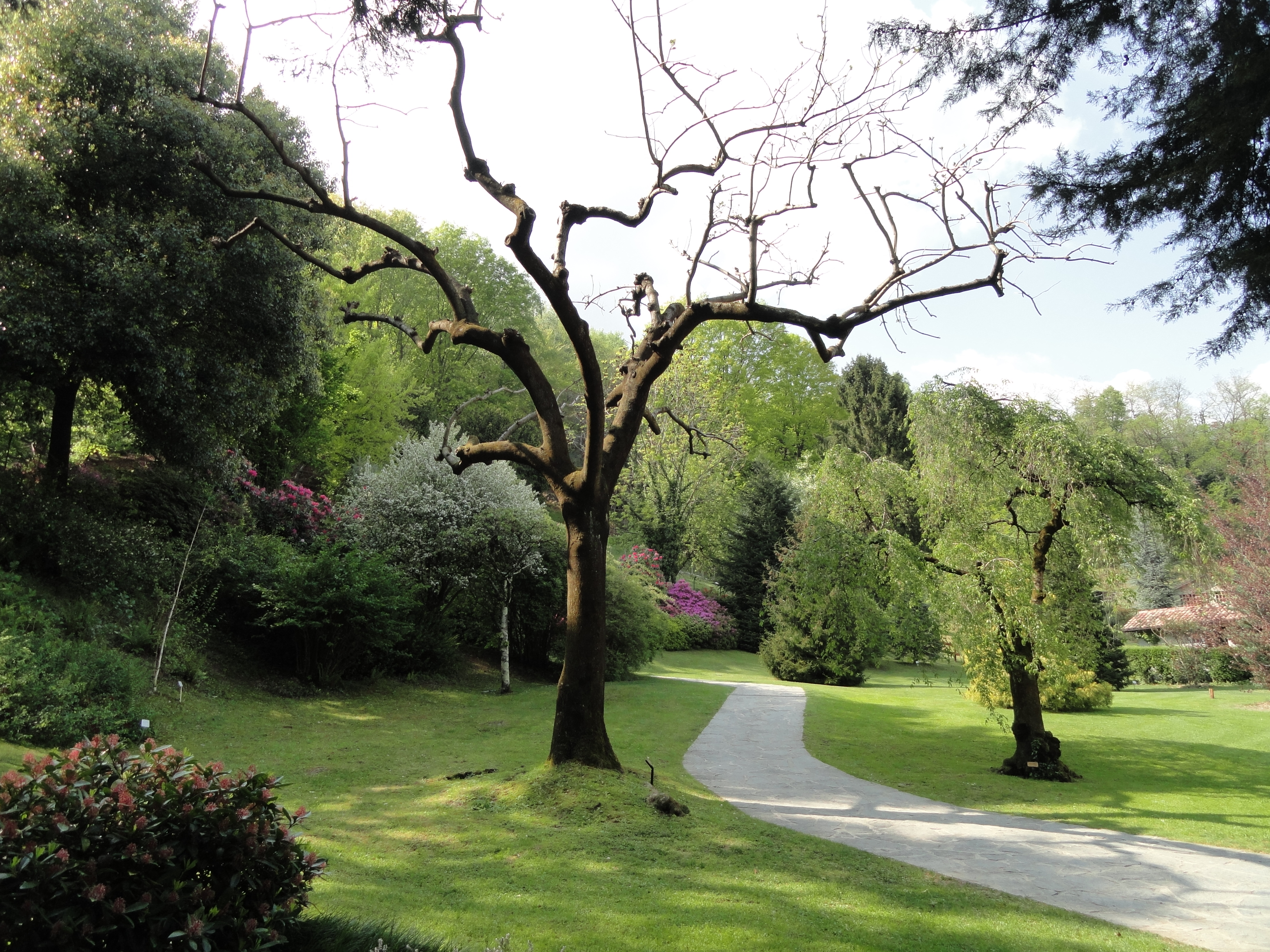 Villa Carlotta (Tremezzo), on Lake Como, Italy.